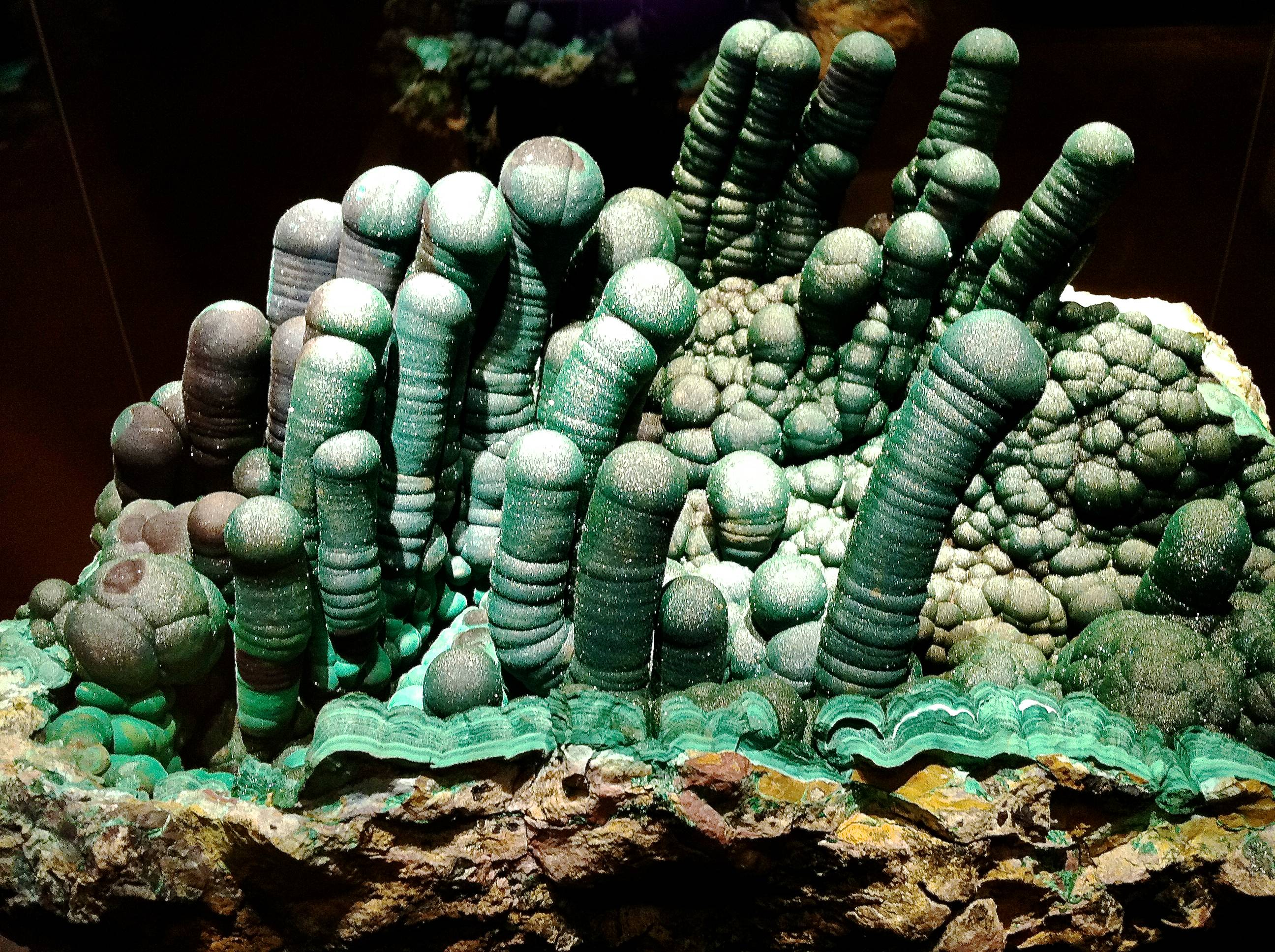 Malachit-Großstufe aus dem Kongo; Sammlung terra mineralia (Freiberg / Sachsen)